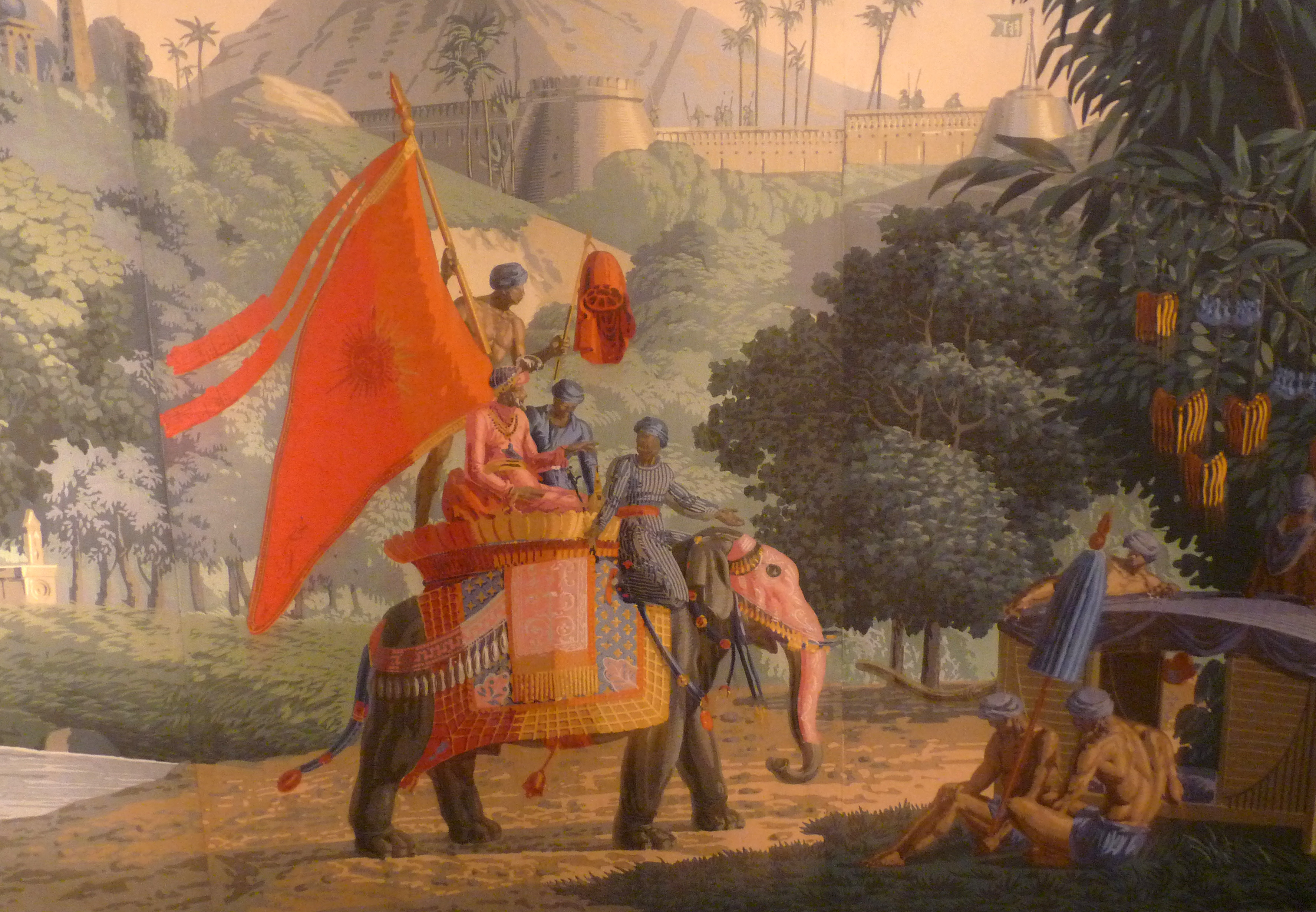 Papier peint Hindoustan (détail) de Pierre-Antoine Mongin (1761-1827) pour la manufacture Zuber & Cie. Musée de la Compagnie des Indes (Lorient)